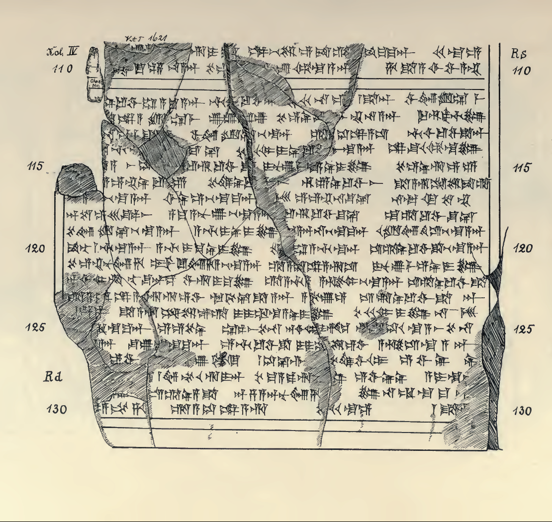 List Tuszratty do Amenhotepa III w języku huryckim – autografia.